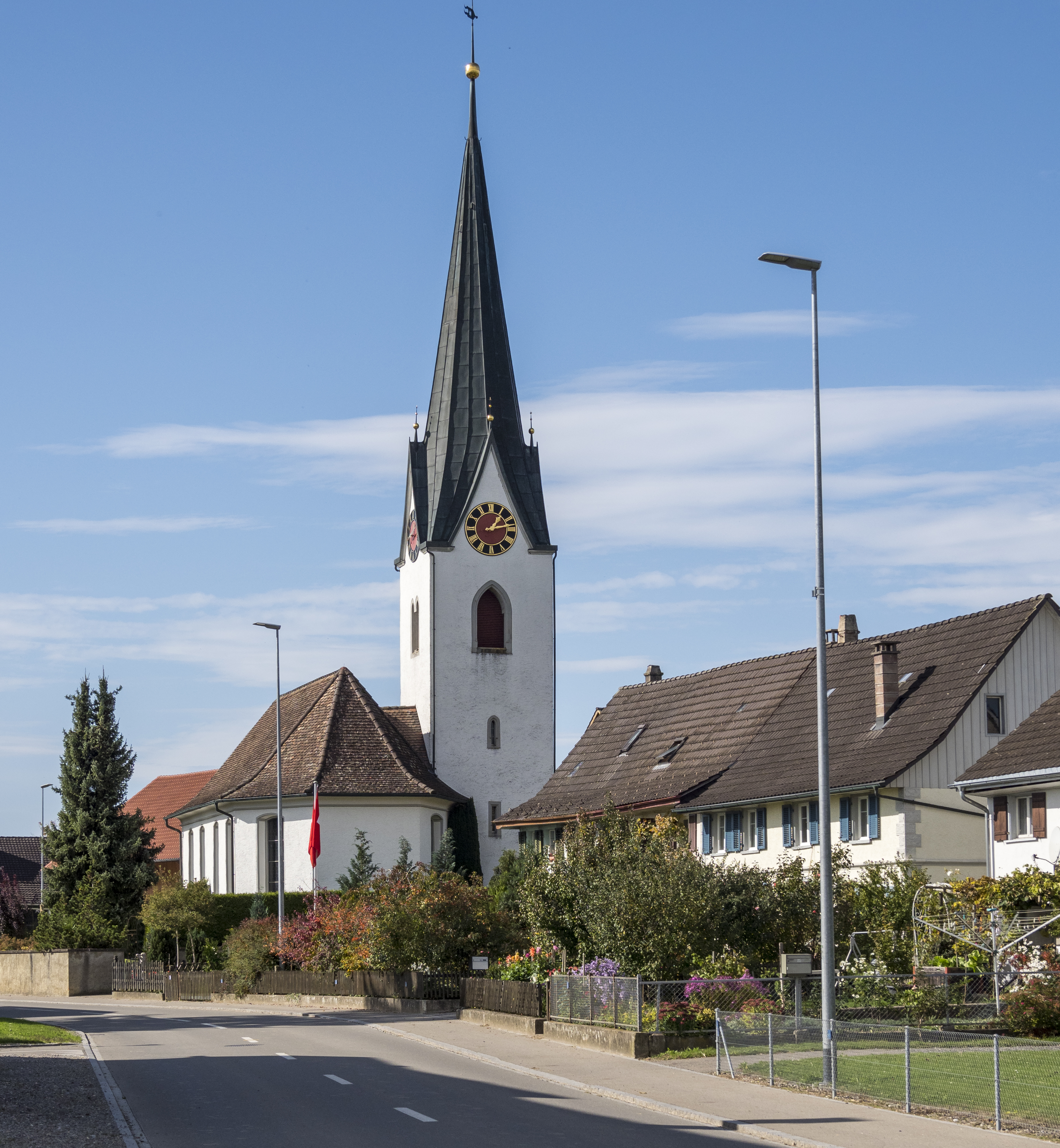 Birwinken TG: Hauptstrasse mit Evangelischer Kirche und zusammengebauten Häusern aus dem 19. Jahrhundert.